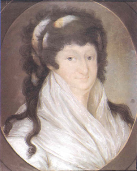 Беларуская (тарашкевіца): Партрэт Марыі Вікторыі Марыконі (Maryja Viktoryja Marykoni) з князёў Радзівілаў (Radzivił)